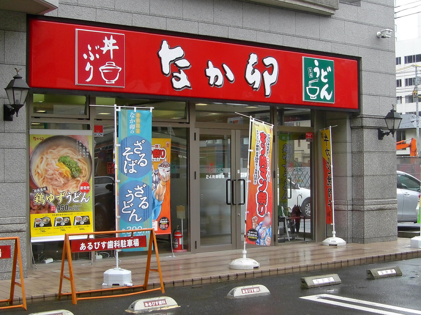 なか卯仙台東口店